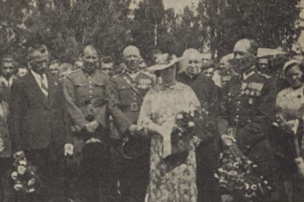 Асвячэнне звана імя Юзафа Пілсудскага ў вёсцы Вяце (цяпер Мёрскага раёна Віцебскай вобласці)